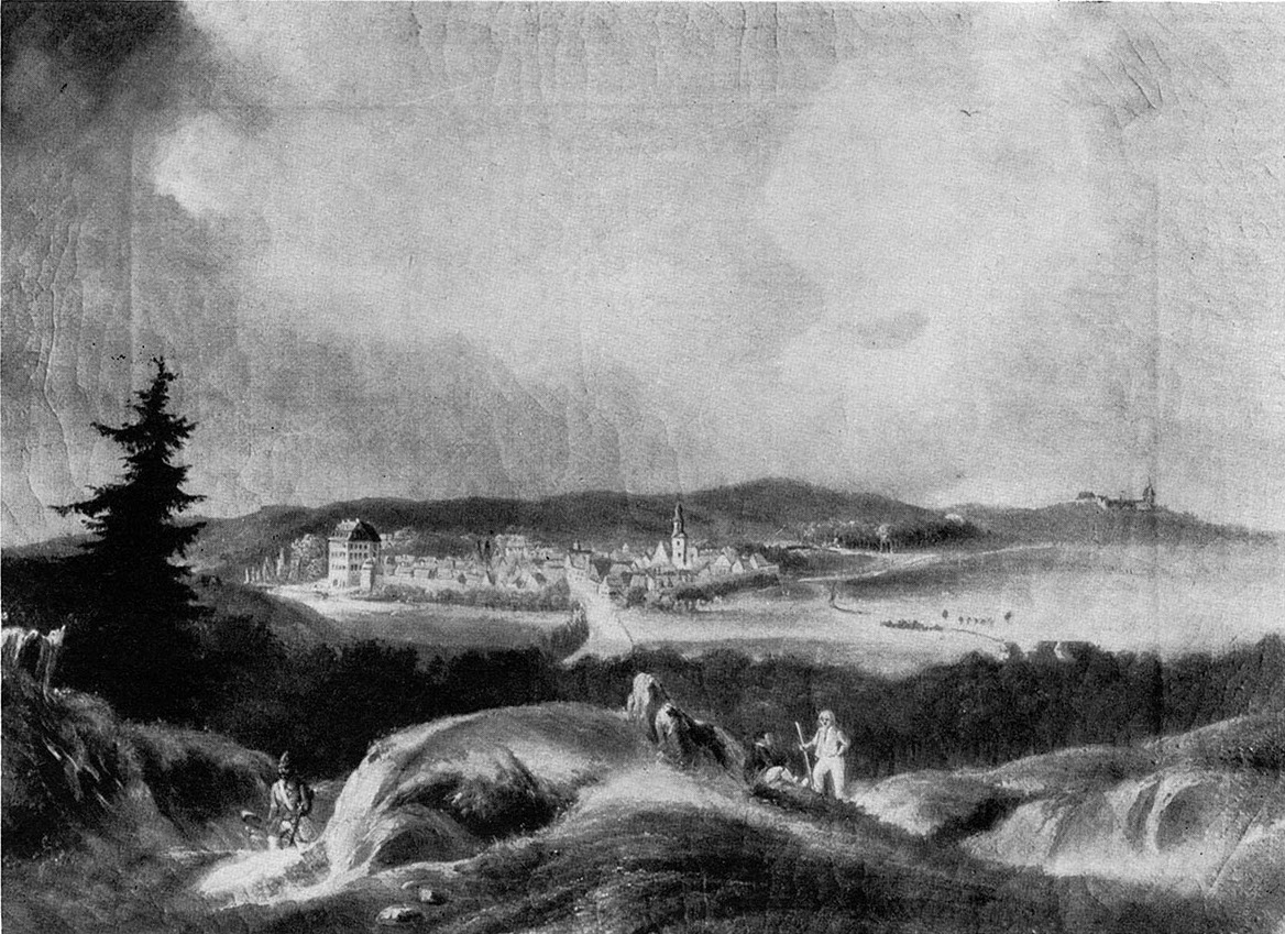 Assenheim